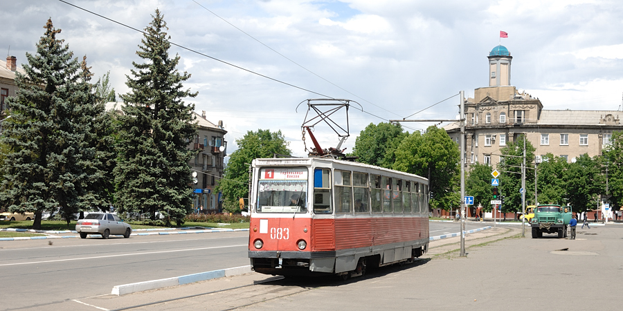 KTM-5 083 in Druschkiwka